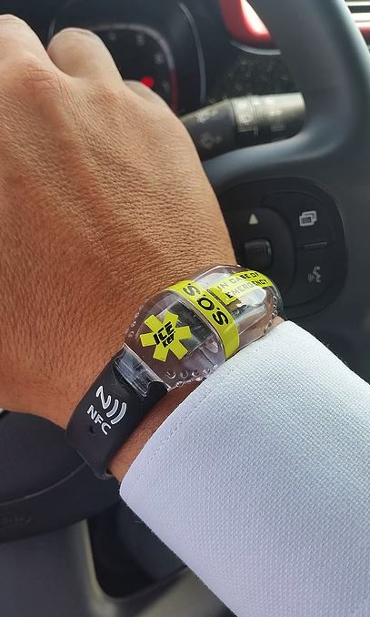 Immagine di bracciale con supporto ICE KEY, chip NFC e chiavetta memorizzazione USB